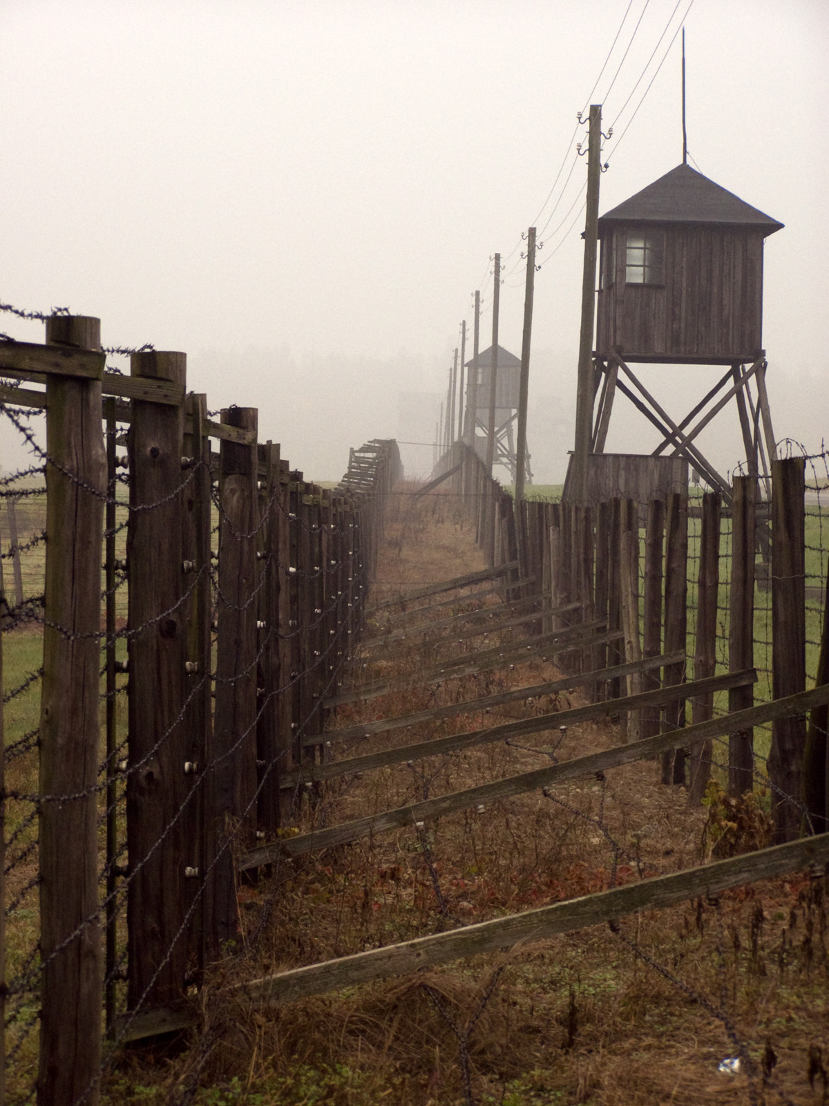 KL Majdanek. Mglisty październikowy poranek 2008.